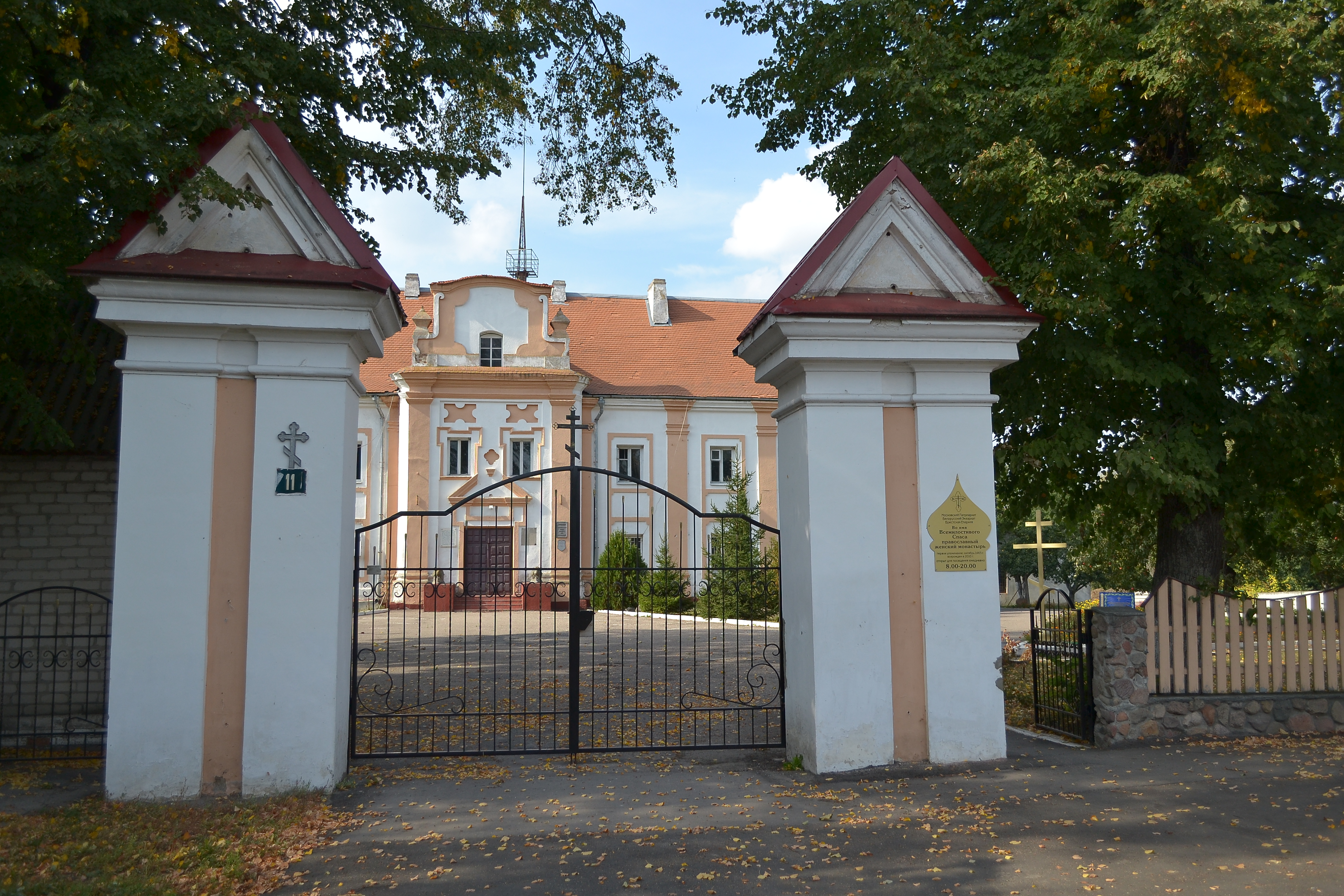 Беларуская (тарашкевіца): Будынак былога Спаскага манастыра(ru). г. Кобрынь This is a photo of Belarusian heritage monument. Reference number: 112Г000386 ( WLM)